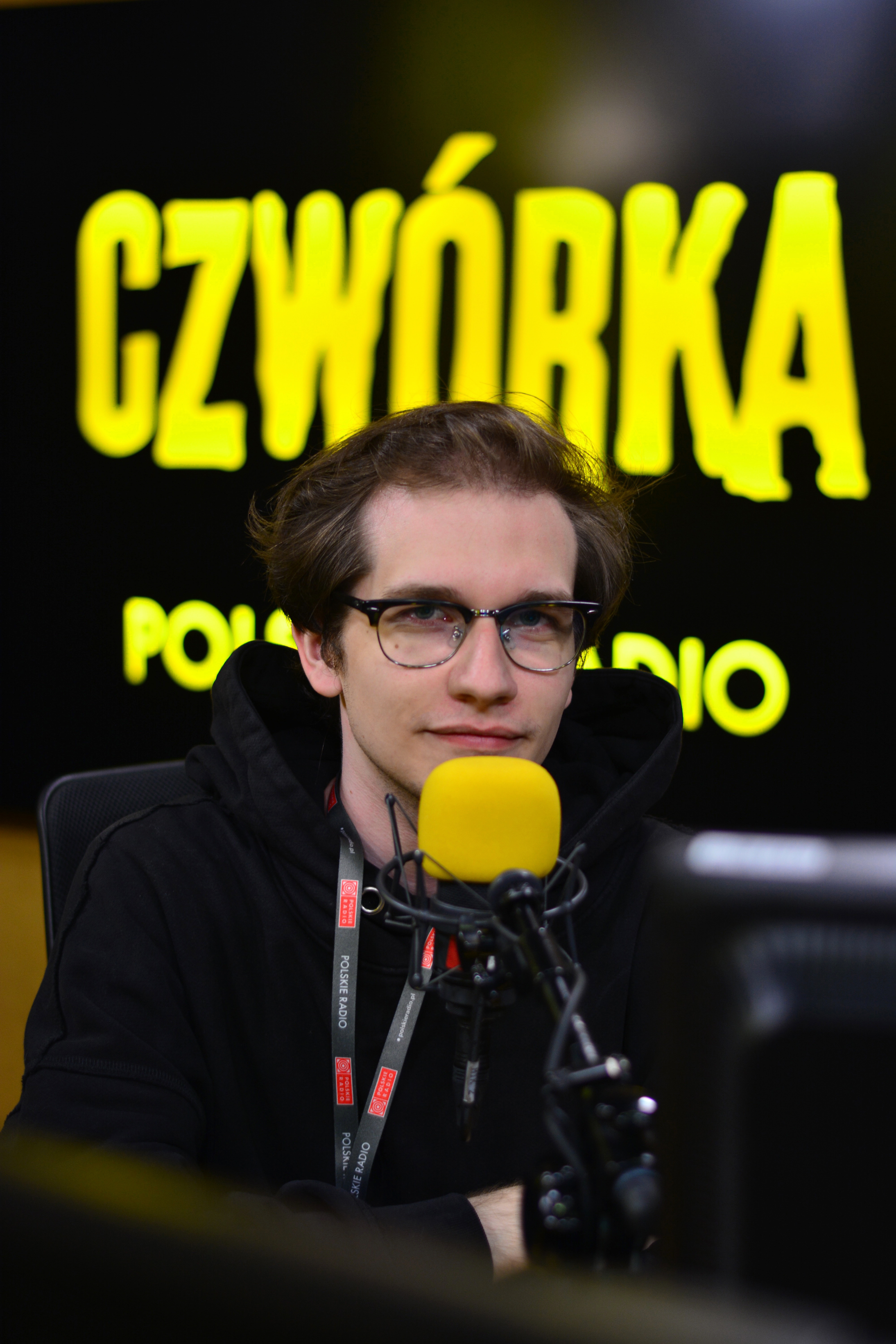 Gargamel w Czwórce podczas audycji "Pogłos"